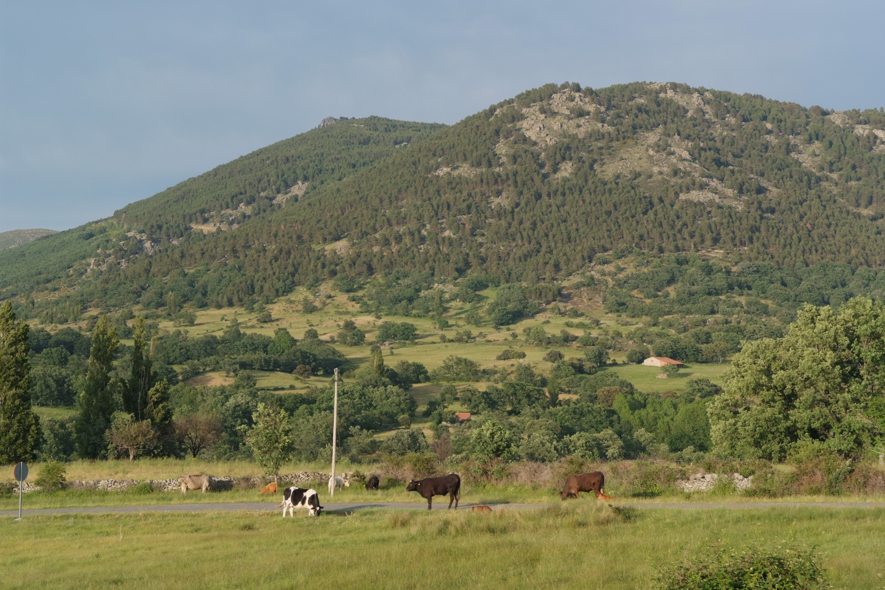 Peña Levante (Villafranca de la Sierra; Ávila; España)